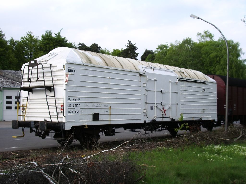 Kühlwaggon Nr. 8 der Delmenhorst-Harpstedter Eisenbahn in Harpstedt